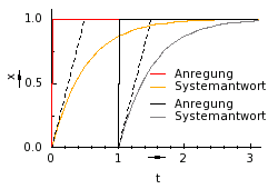 Zeitinvarianz, Verschiebung